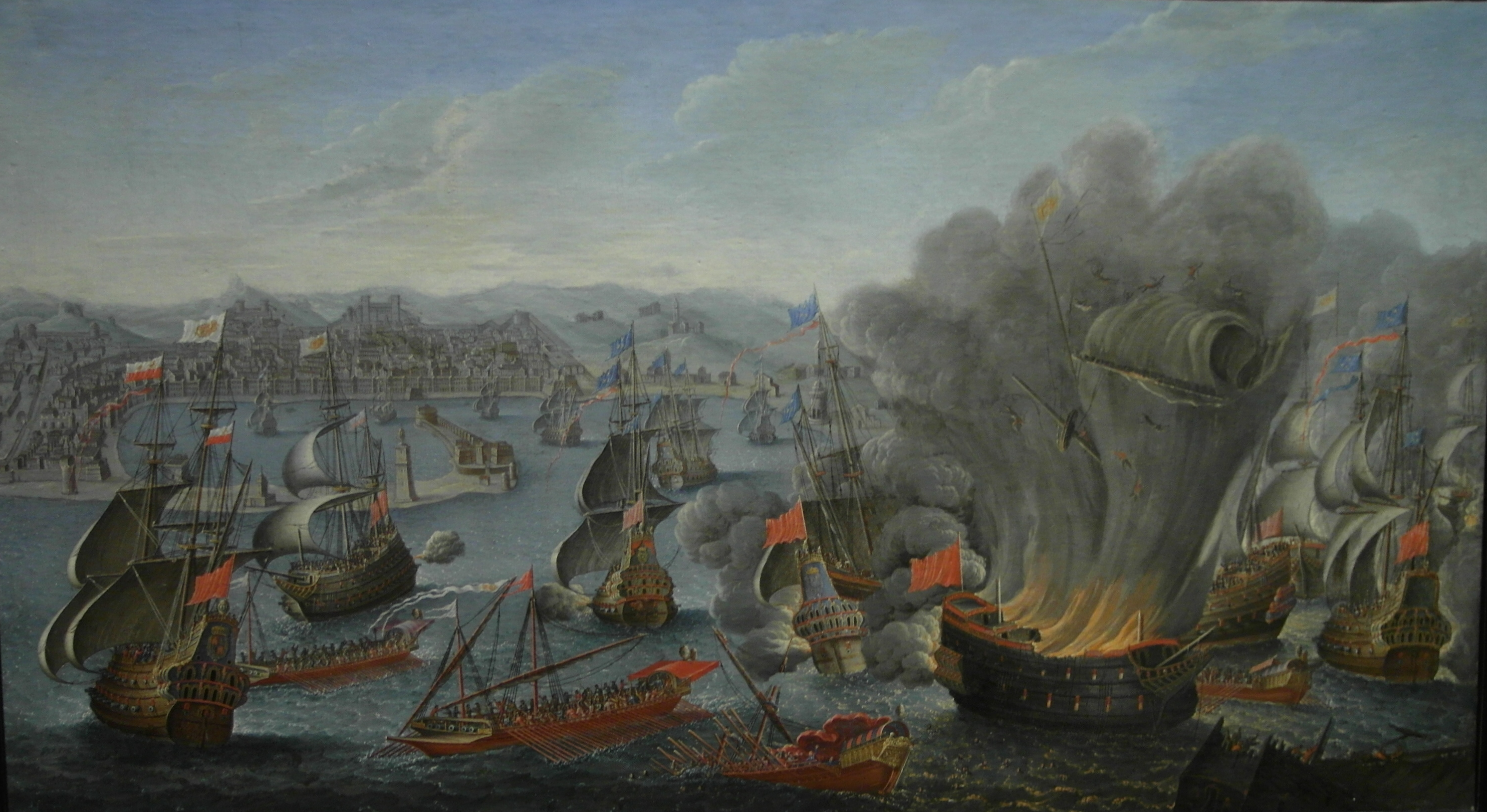 Combate naval de Palermo, 2 de junio de 1676, cuadro de Pierre Puget (1677).